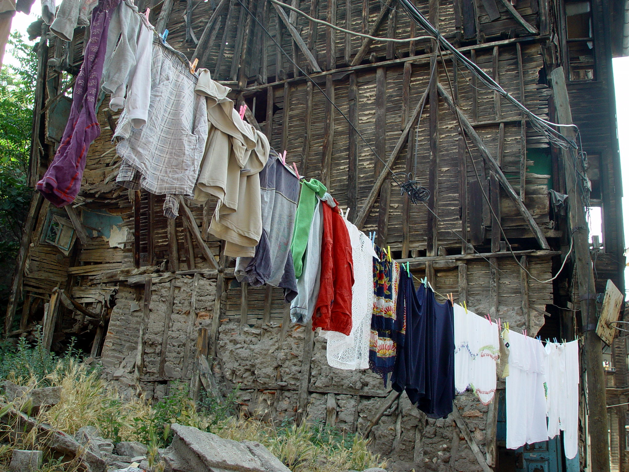 Istanbul Turkey